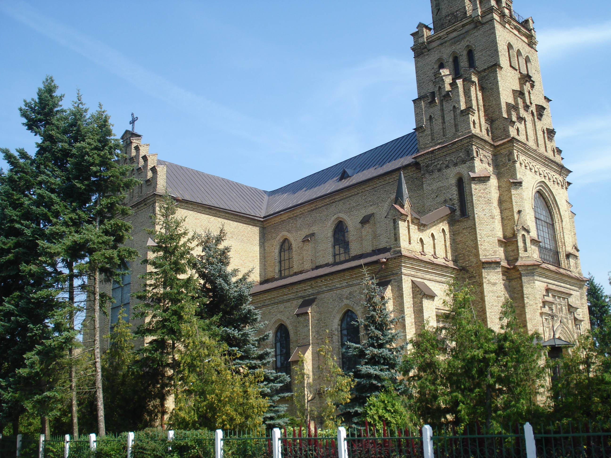 Church of St. Casimir (Švento Kazimiero Naujosios Vilnios bažnyčia) in Naujoji Vilnia (Palydovo g. 15)